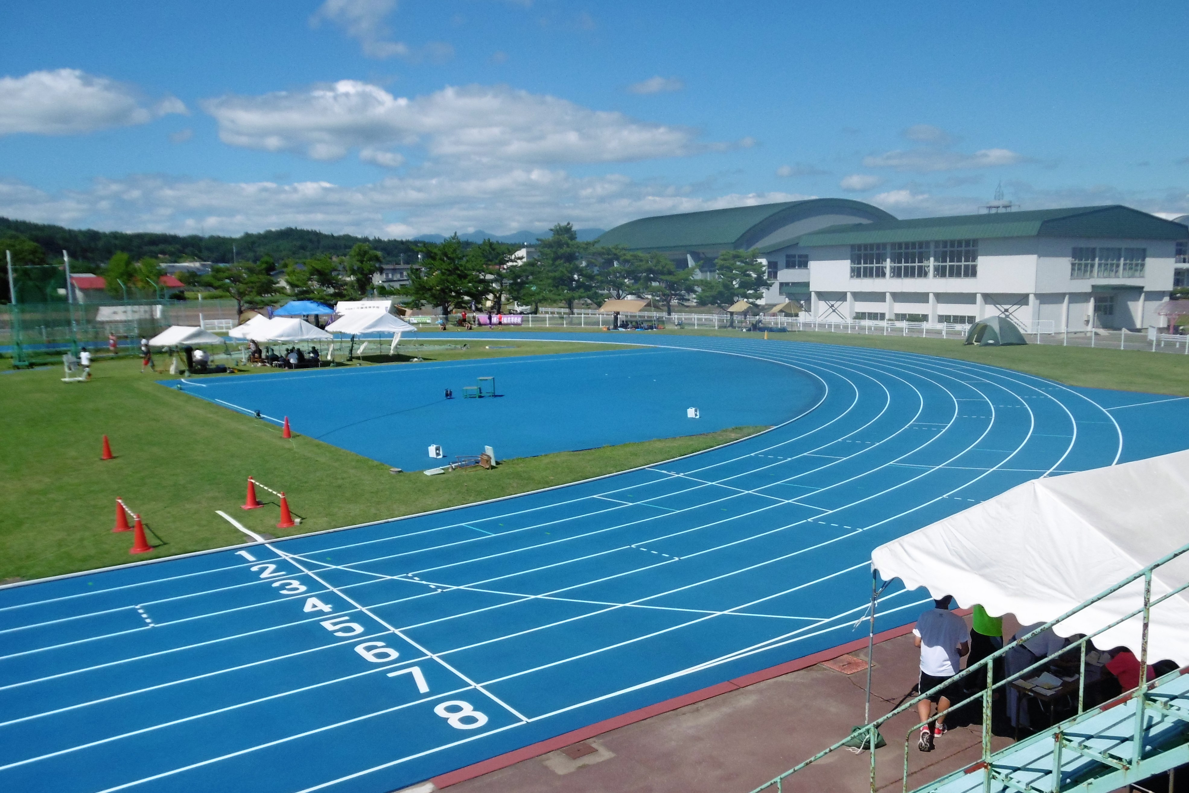 鷹巣陸上競技場 ・秋田県北秋田市